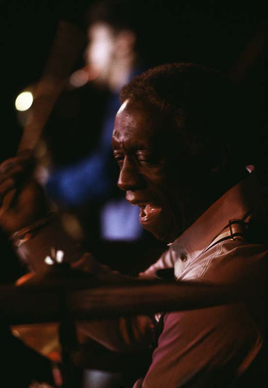 Art Blakey, trummor och ledare för The Jazz Messengers, på Umeå jazzfestival.; Musik; Personer; Övrigt